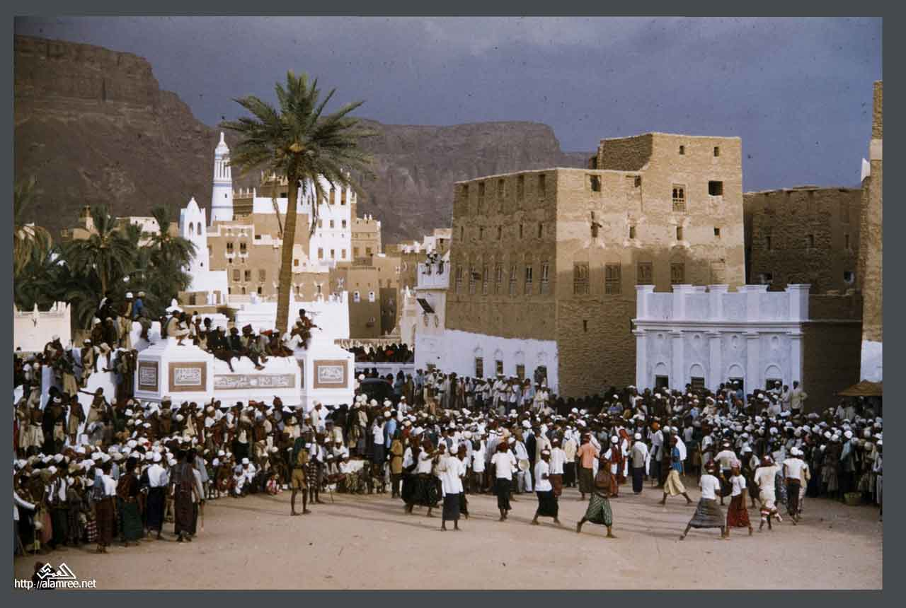 مدينة سيئون حضرموت 1955م